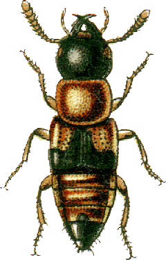 This file has been extracted from another file: Jacobs14.jpg